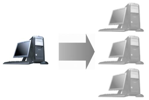 Virtualization